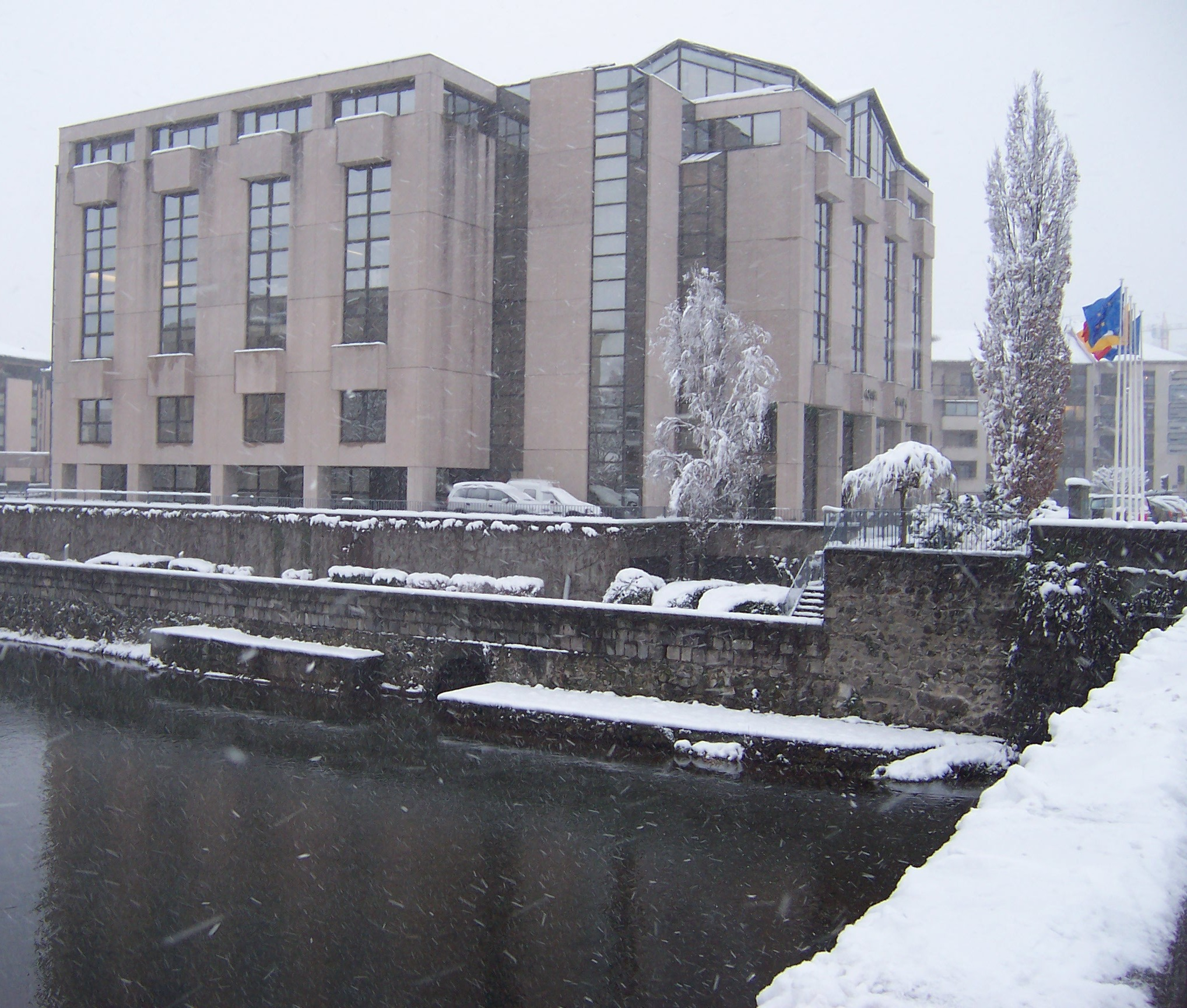 Conseil Général du Cantal building in the center of Aurillac, Cantal, France.